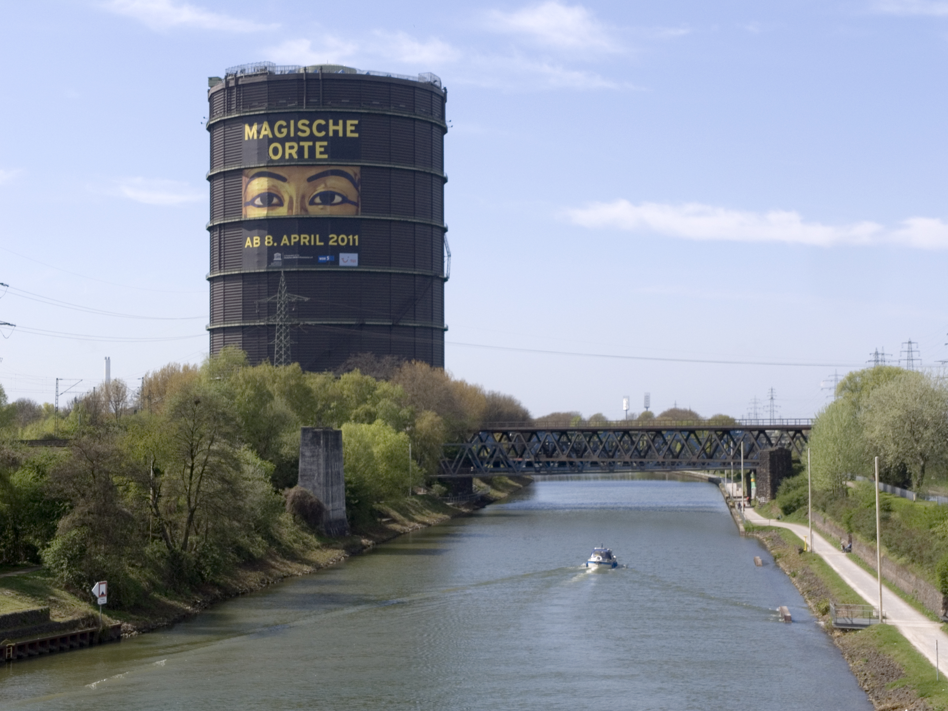 Северный Рейн - Вестфалия, Оберхаузен. Газометр